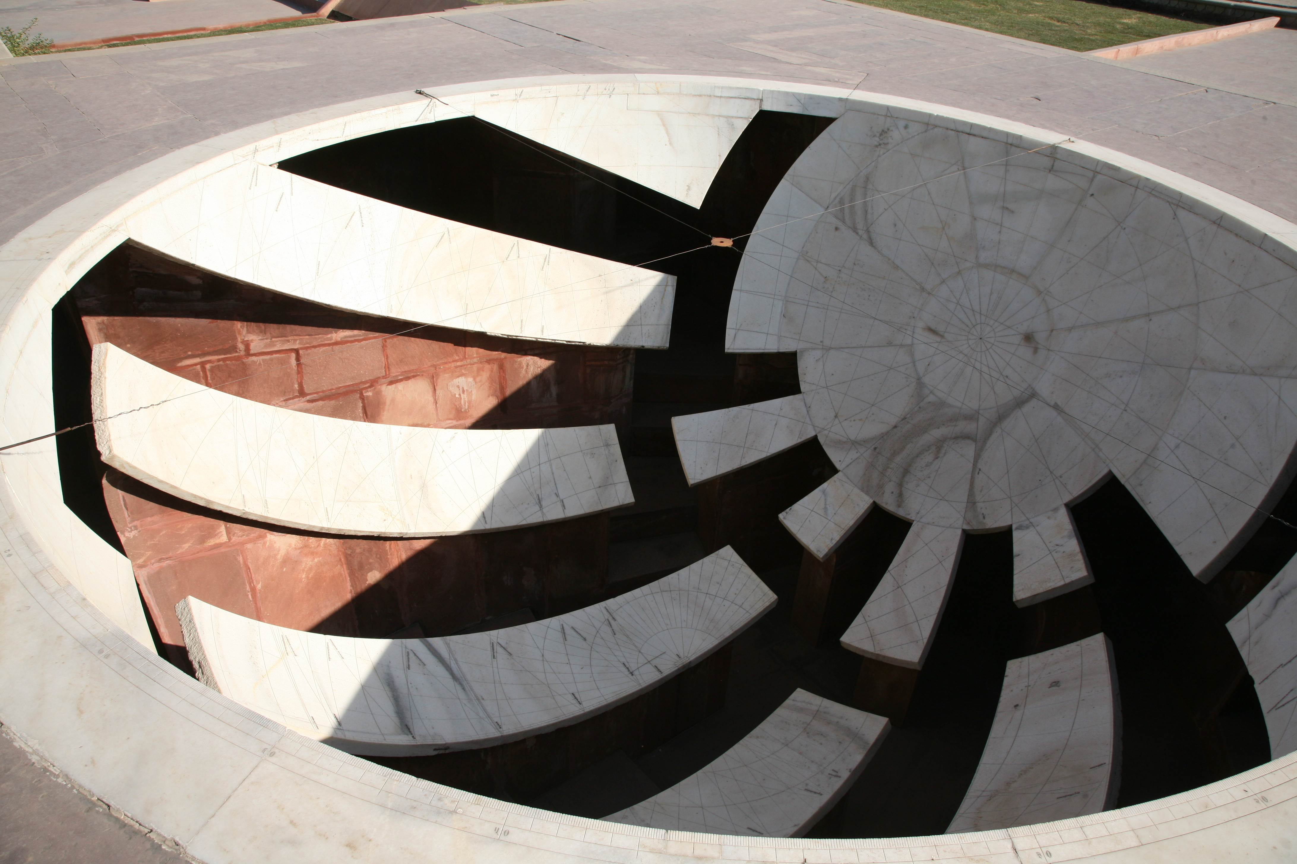 From Jantar Mantar in Jaipur.